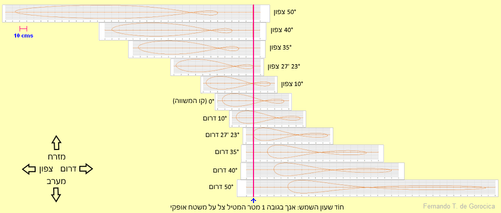 אנלמות בקווי רוחב שונים ברחבי העולם. תורגם על ידי בנימין מהסדנה לגרפיקה מתרשים בספרדית מאת Fernando Gorocica.